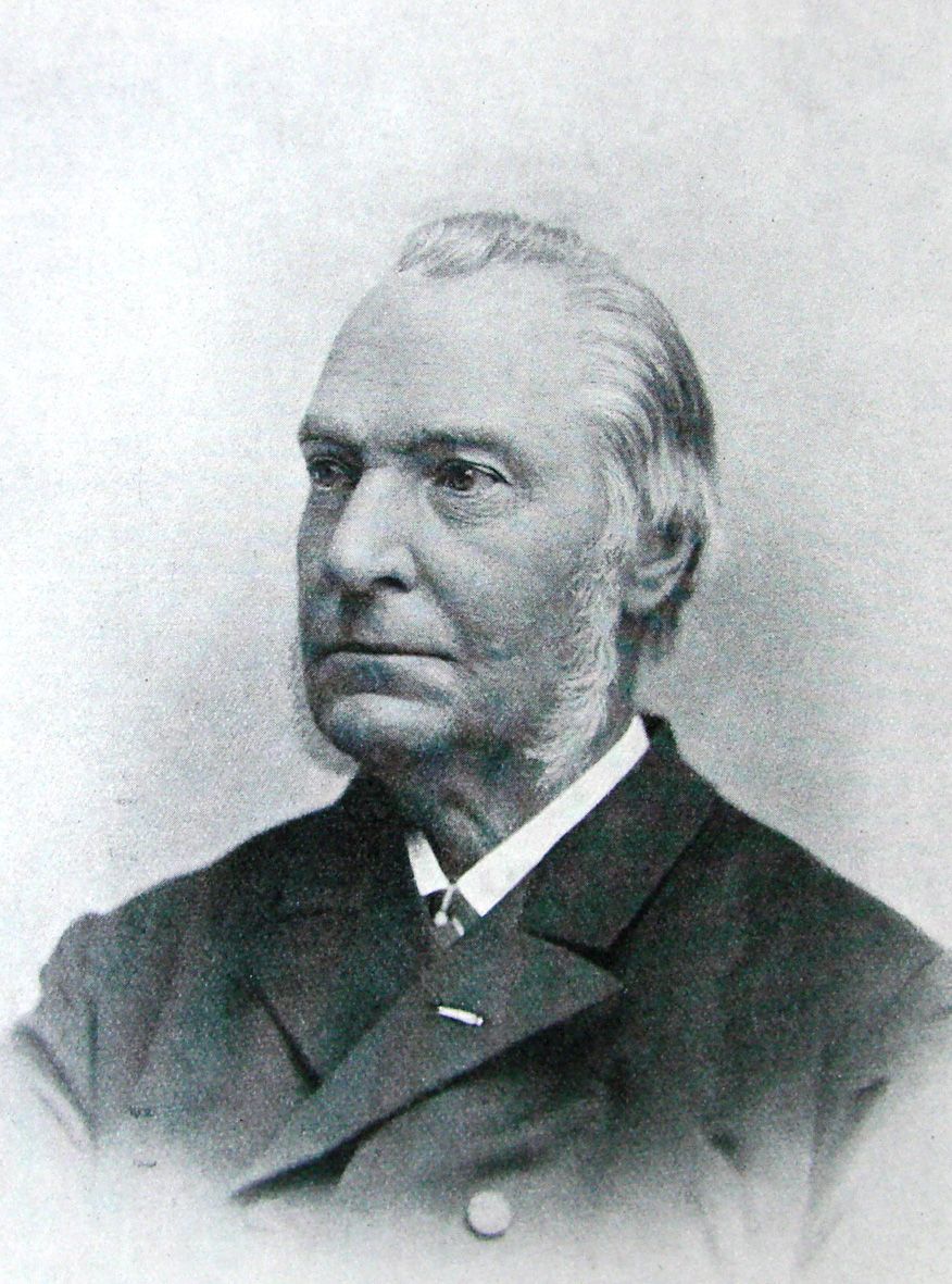 Christian Ernst Richardt (1831–1892) var en dansk digter.